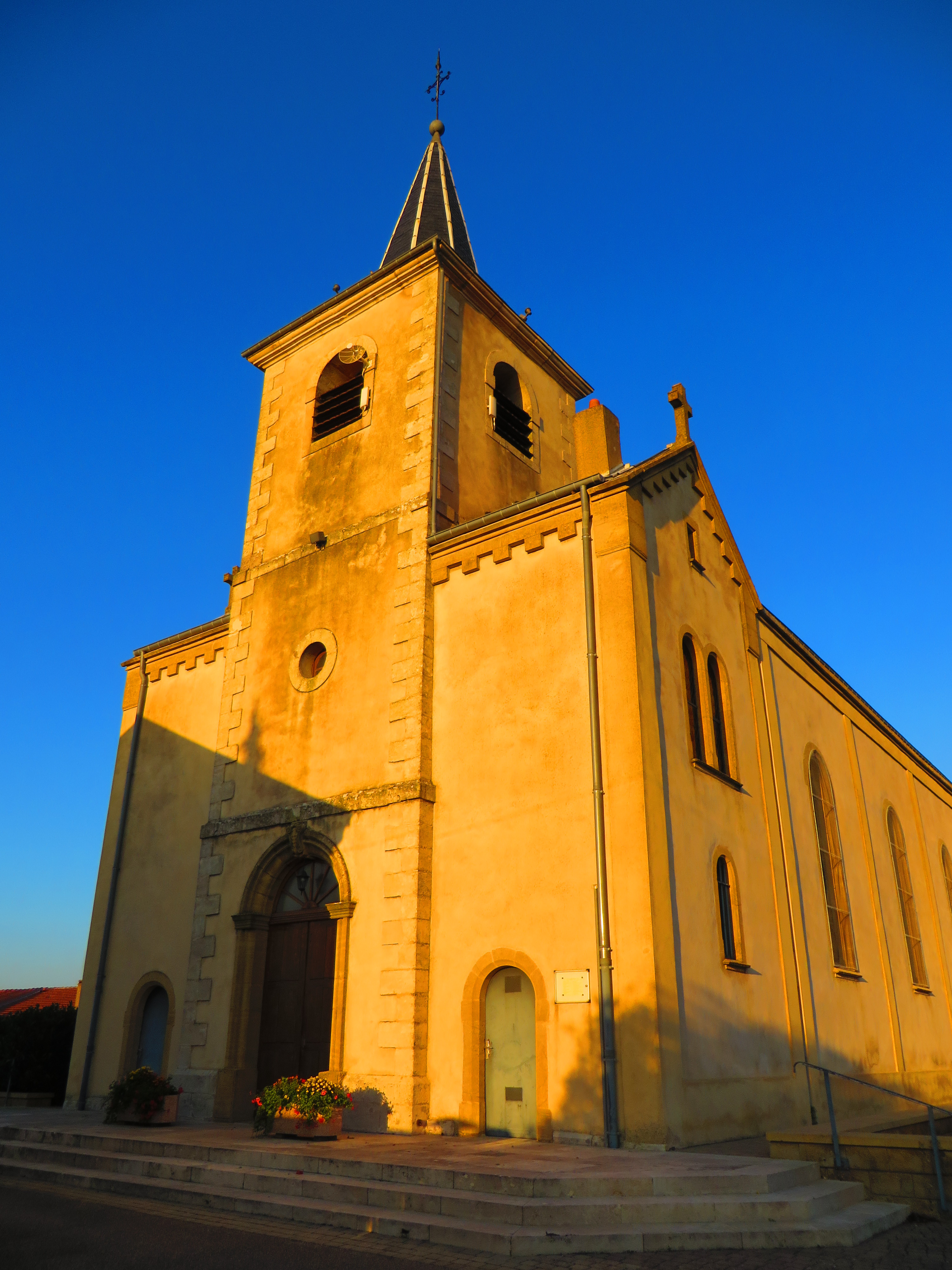 Marthille l'église Saint-Jean-Baptiste